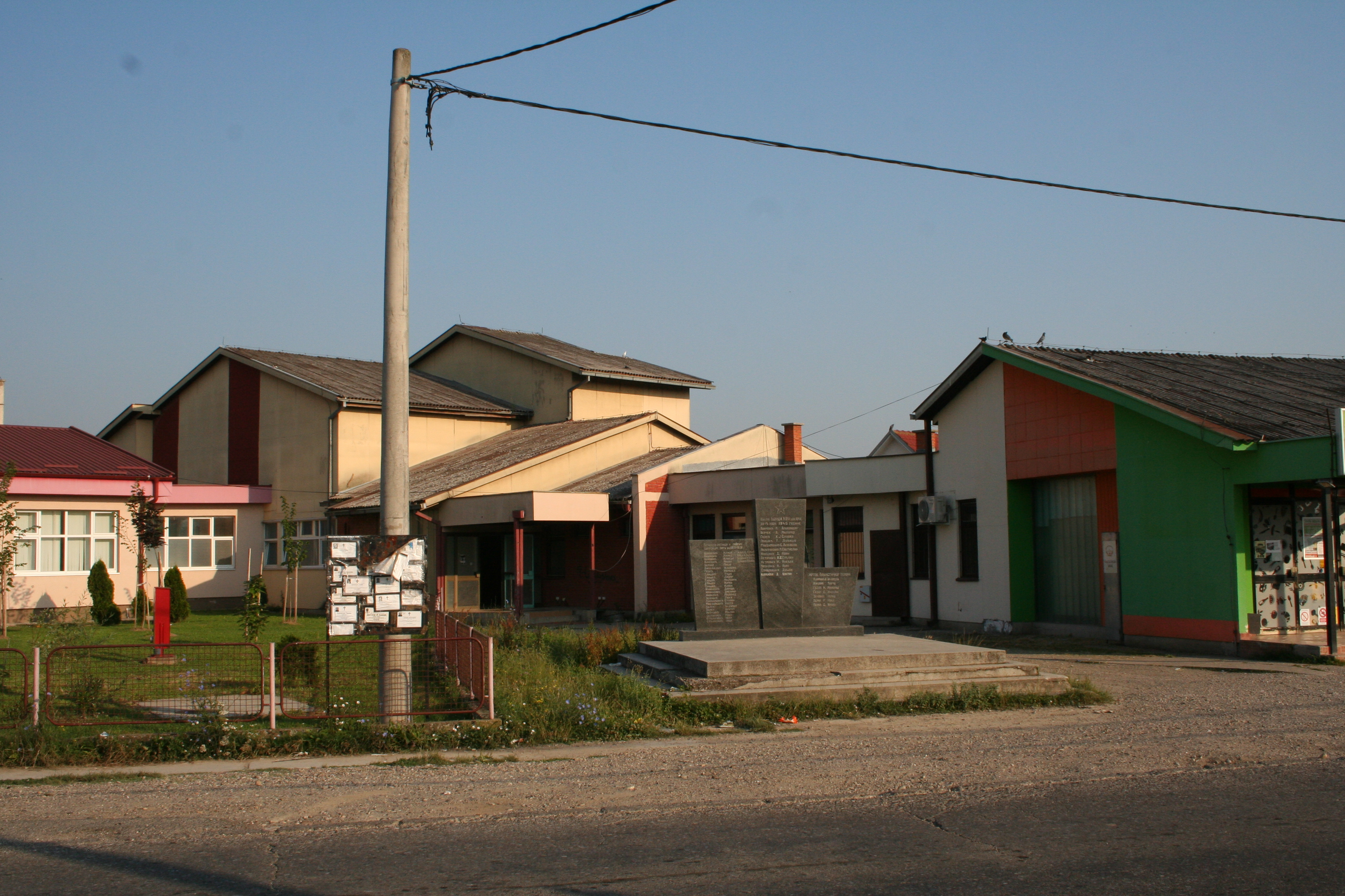 Dom kulture, Jevremovac